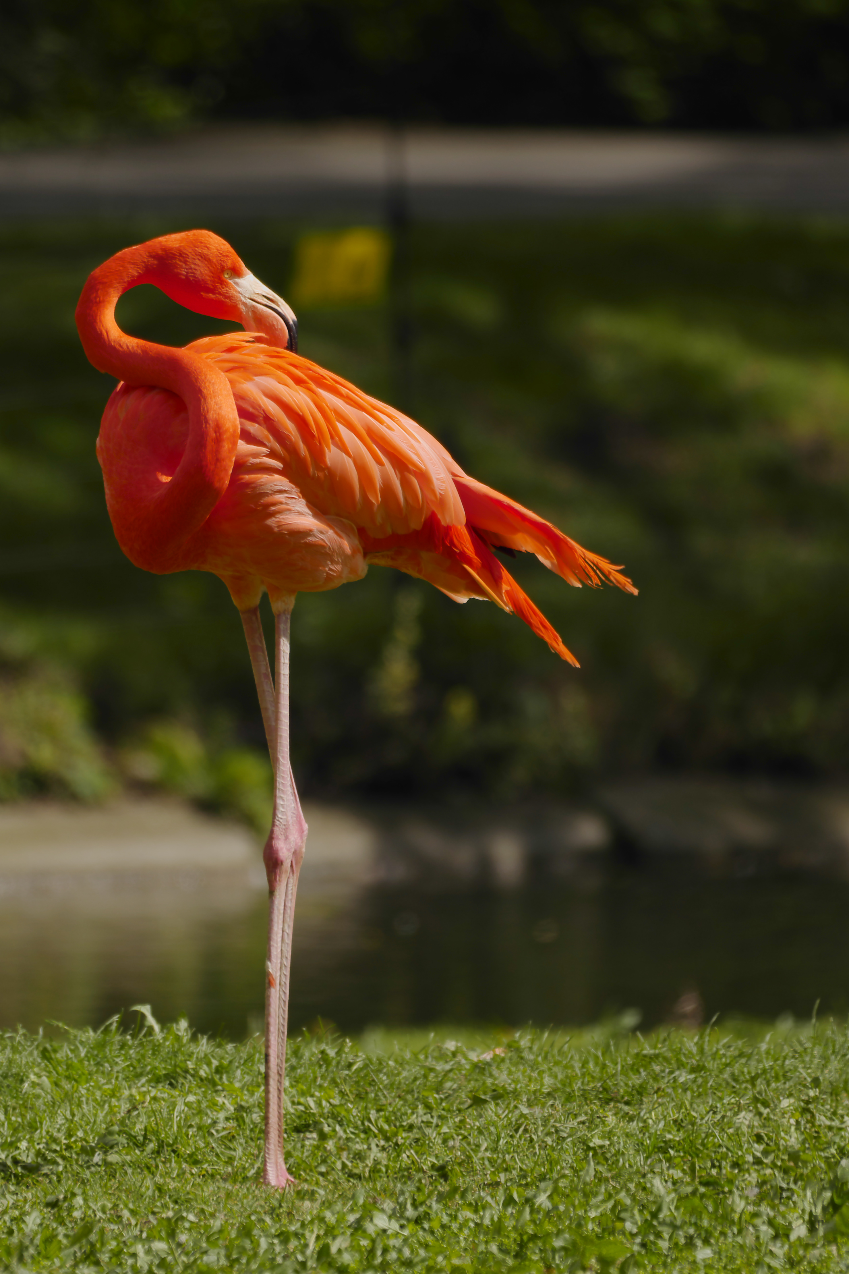 Phoenicoparrus jamesi (Flamingo) im Tierpark Berlin